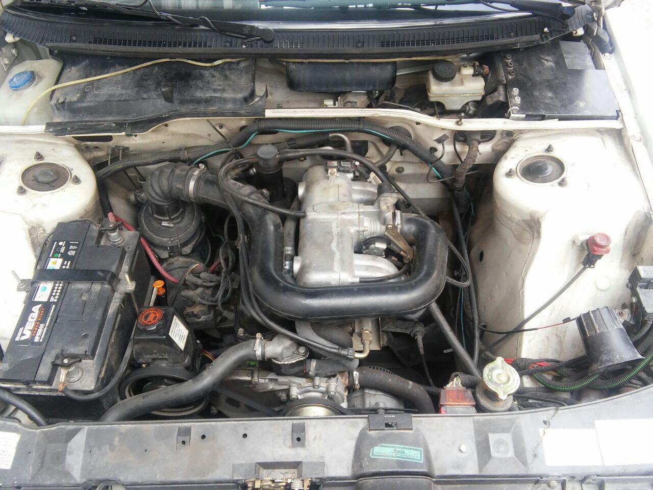 موتور پژو آردی